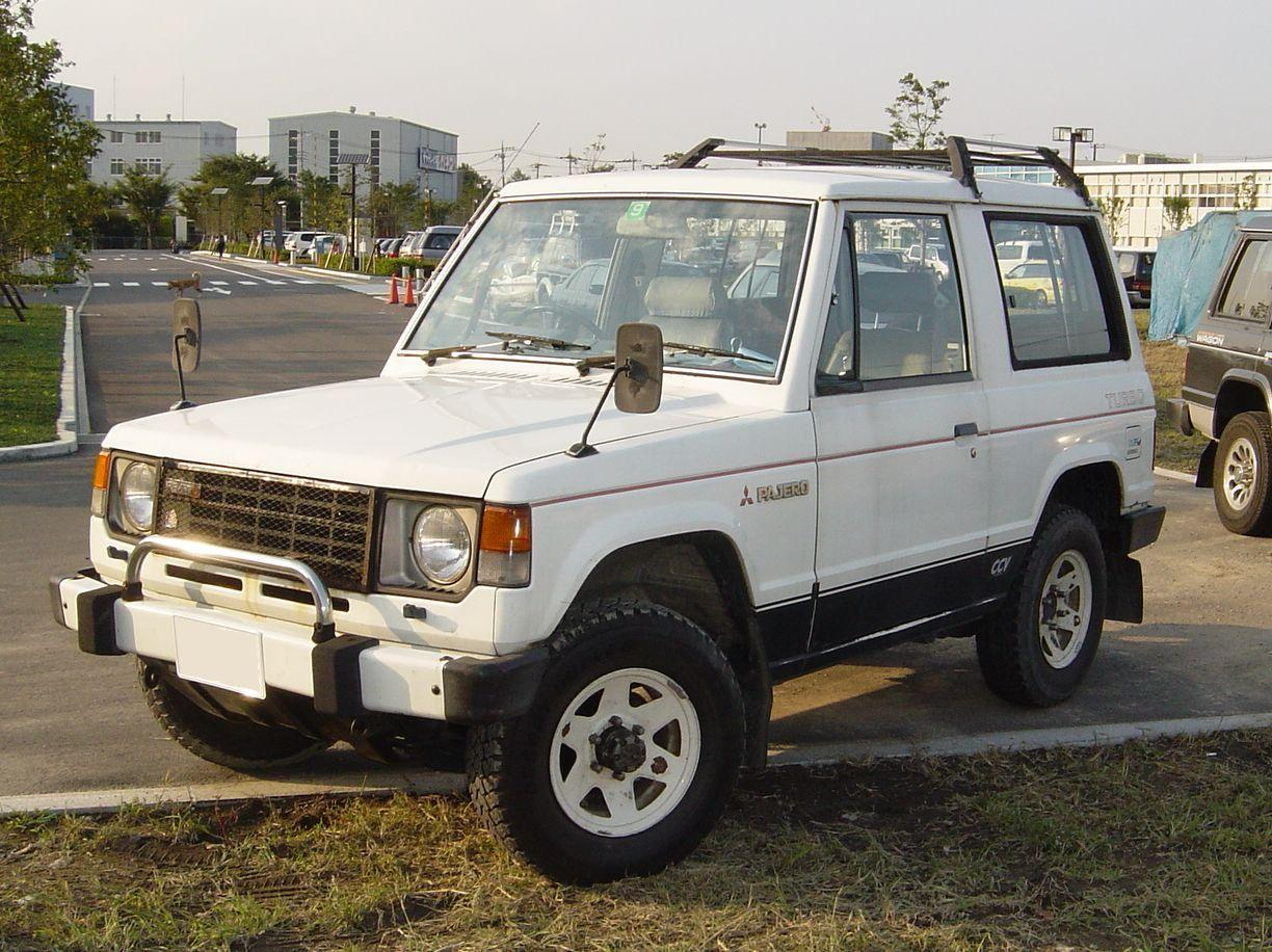 Mitsubishi Pajero mk I.